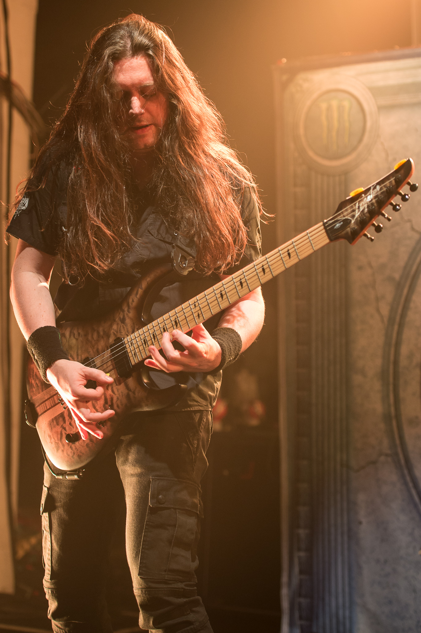 Anthrax,Jonathan Donais,Konzert,Livekonzert,Livemusik,Löwensaal,Manfred Hertlein Veranstaltungs GmbH,Musik